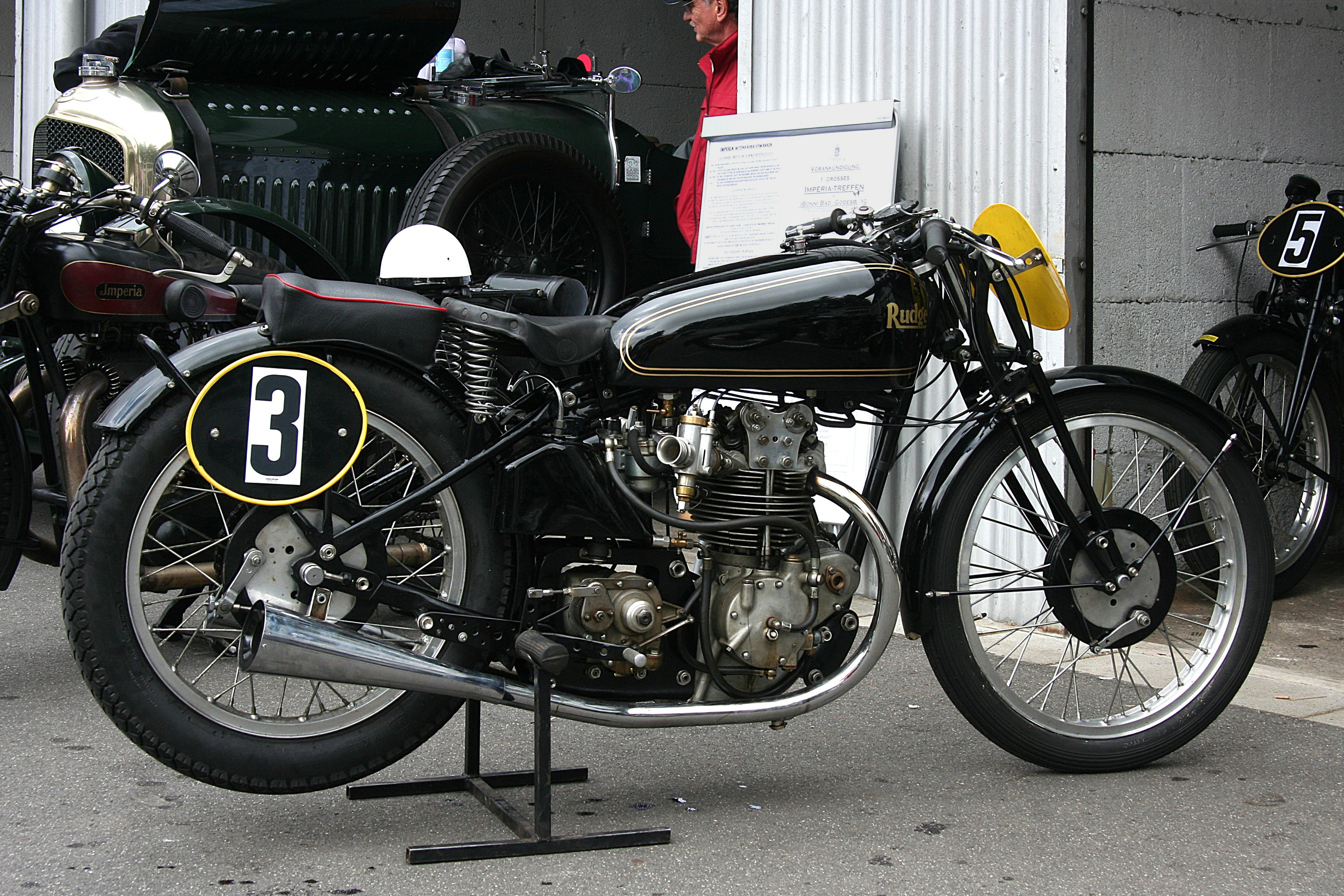 Rudge Brumm Special, 350 cm³, Baujahr 1937, beim Oldtimer Festival des DAMC im historischen Fahrerlager des Nürburgrings